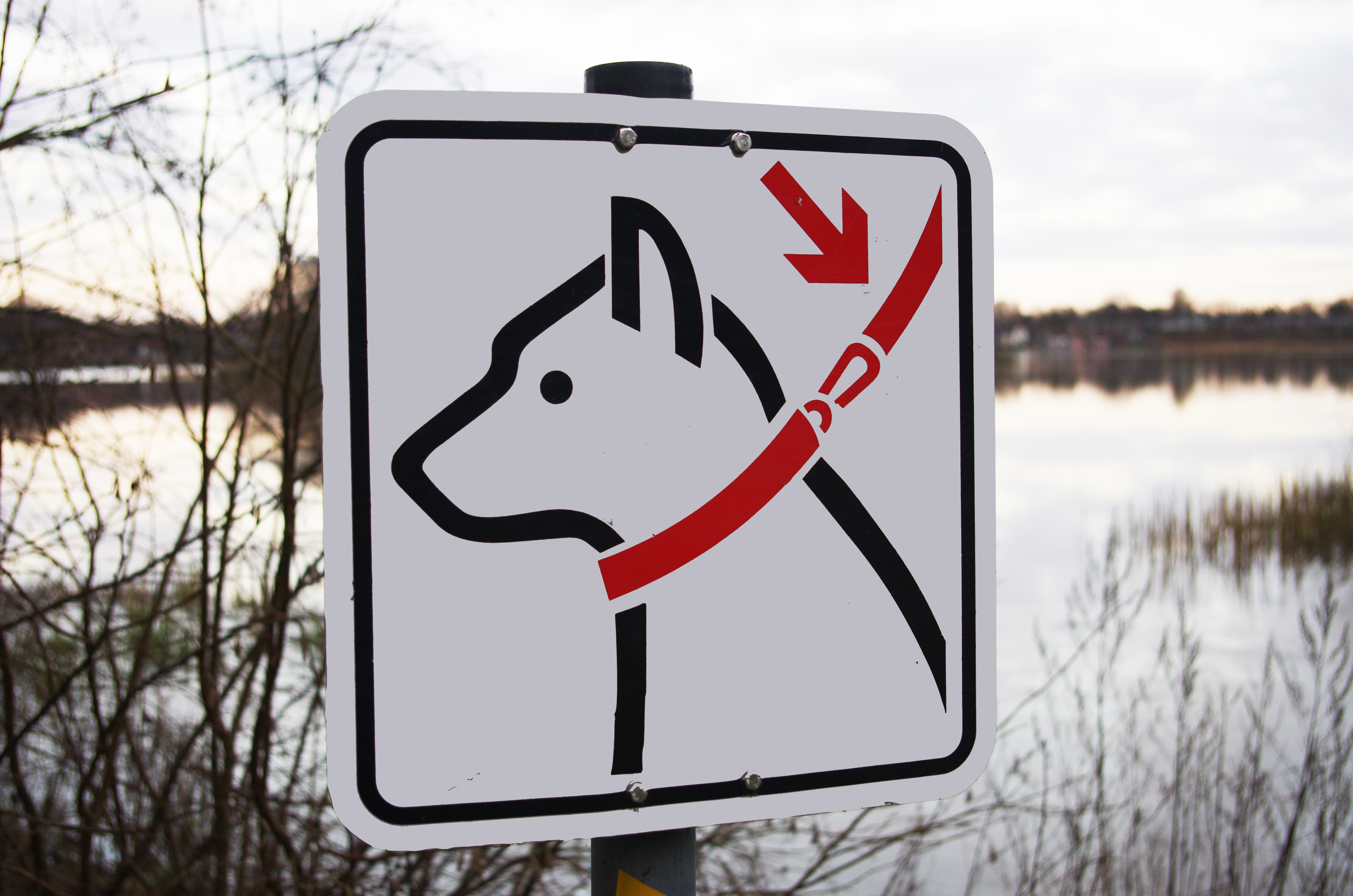 Schild mit Hinweis auf Leinenpflicht, Deutschland